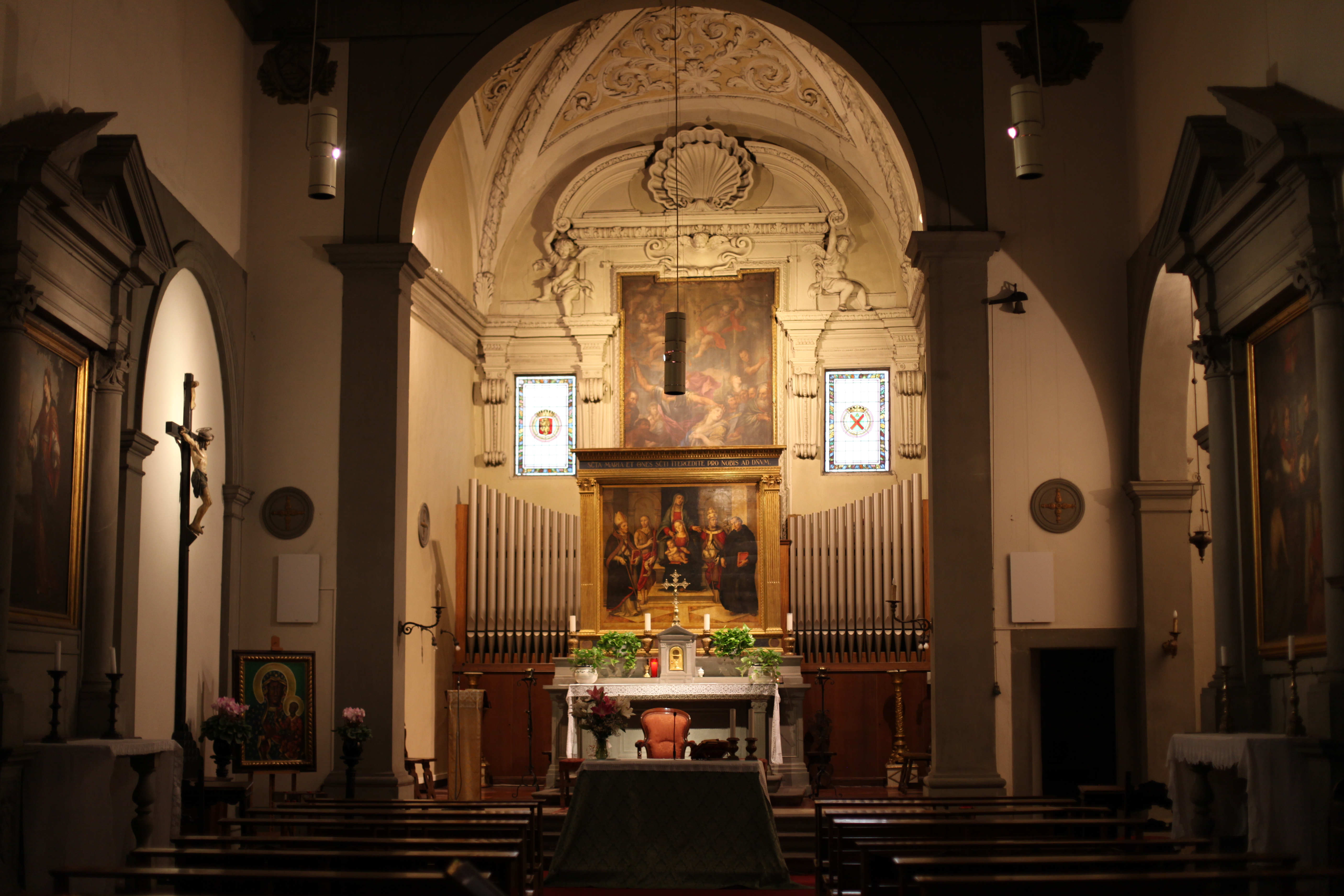 Interno della chiesa di Santa Lucia dei Magnoli (Firenze)